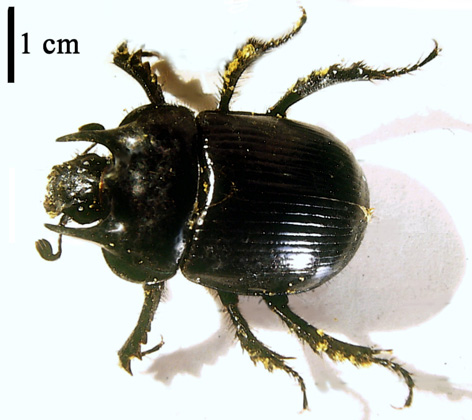 Typhaeus typhoeus mâle (ou espèce très proche, car sur ce secteur la pointe centrale est inhabituellement arrondie). C'est une des nombreuses espèces de coléoptères qu'on trouvait autrefois communément sur le Plateau d'Helfaut. C'est un bousier qui enterrait les crottes de mouton en y pondant ses œufs. Après la disparition des moutons, ils ont survécu en nourrissant leurs larves de crottes de lapin, mais ils ont presque disparu dans les années 1990. Ils sont plus abondant dans les zones sableuses, mais on en trouve parfois creusant leurs galeries sur des sols argileux, y compris relativement secs et durs, voire caillouteux (silex en l'occurrence). Lieu : Ce spécimen a été photographié près de la colonne d'Helfaut entre Helfaut et Blendecques.